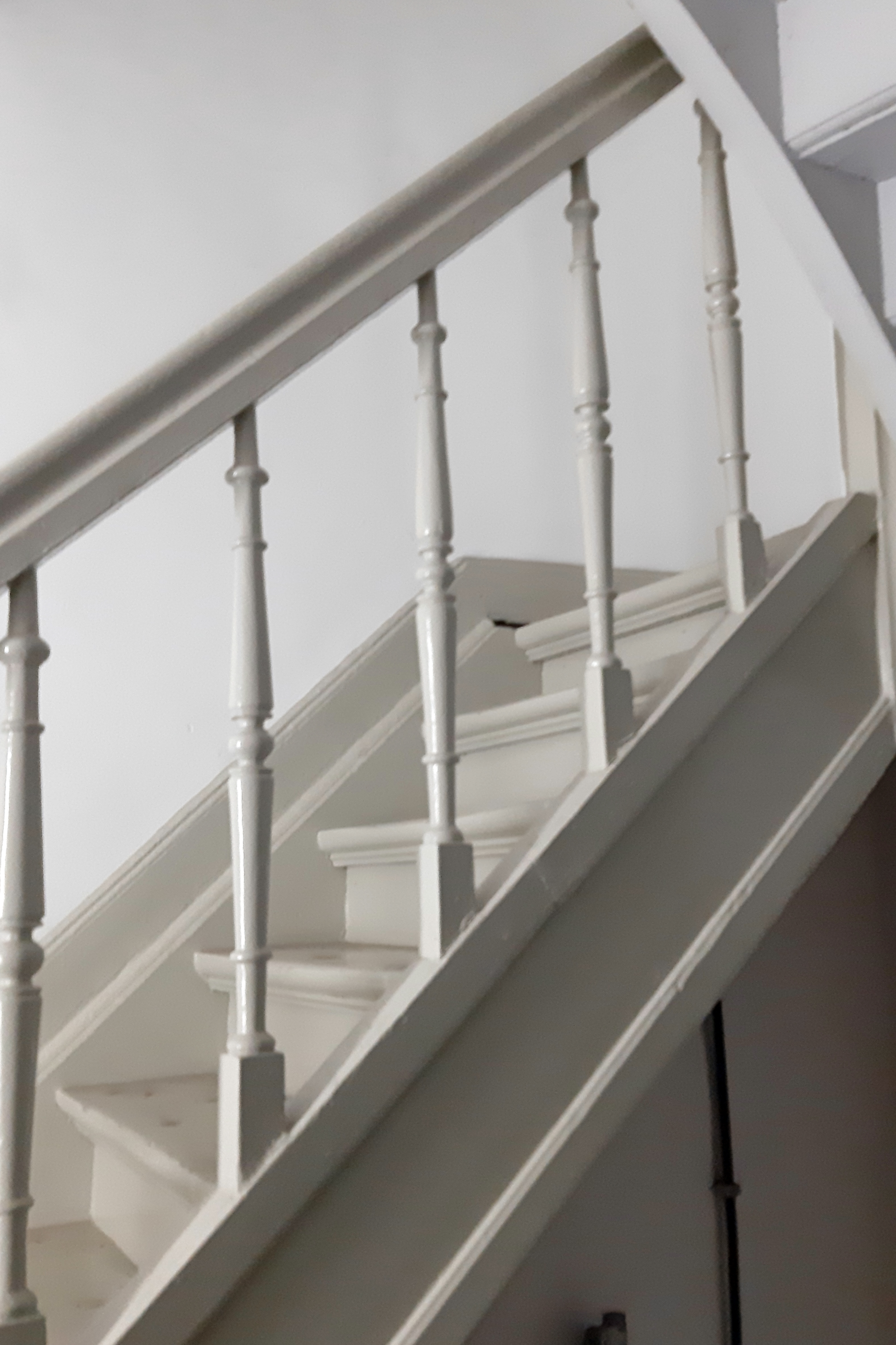 Treepenhaus des 1897 errichteten Wasserturms in Essen-Bedingrade/Frintrop